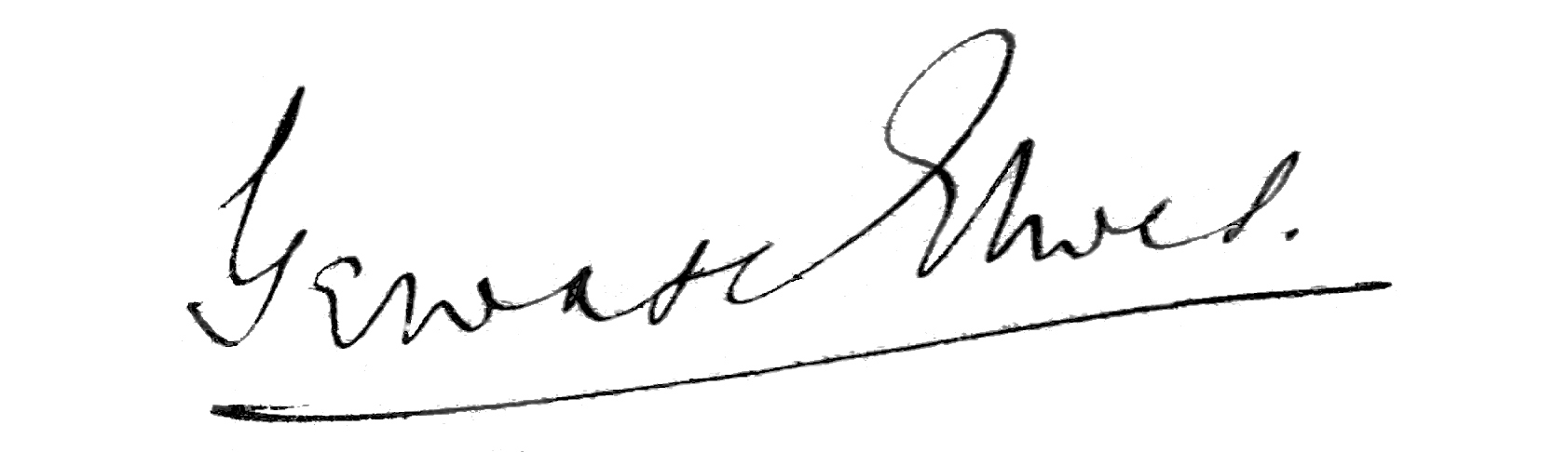 Signature du ténor britannique Gervase Elwes (1866–1921).